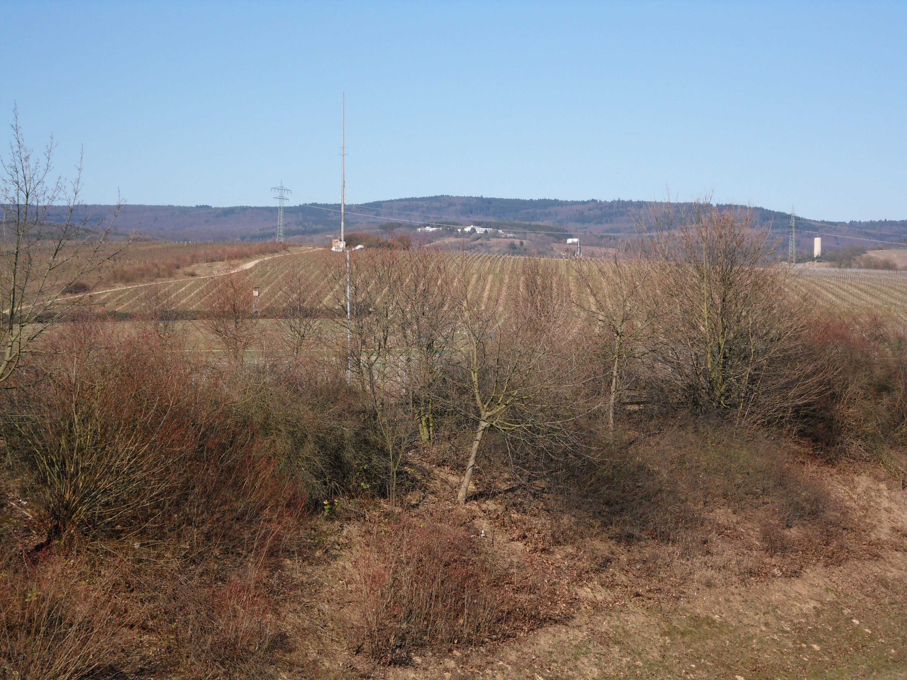 Blick über den zur Gemarkung Eltville zählenden Teil der Weinbergslage Kiedricher Sandgrub auf das bewaldete Rheingaugebirge mit seiner zweithöchsten Erhebung, dem Erbacher Kopf (580 m), darunter der Gebäudekomplex auf dem Hahnwald bei Kiedrich, am rechten Bildrand der Bergfried von Burg Scharfenstein, darüber der Einschnitt, über den die Straße von Kiedrich nach Hausen vor der Höhe führt